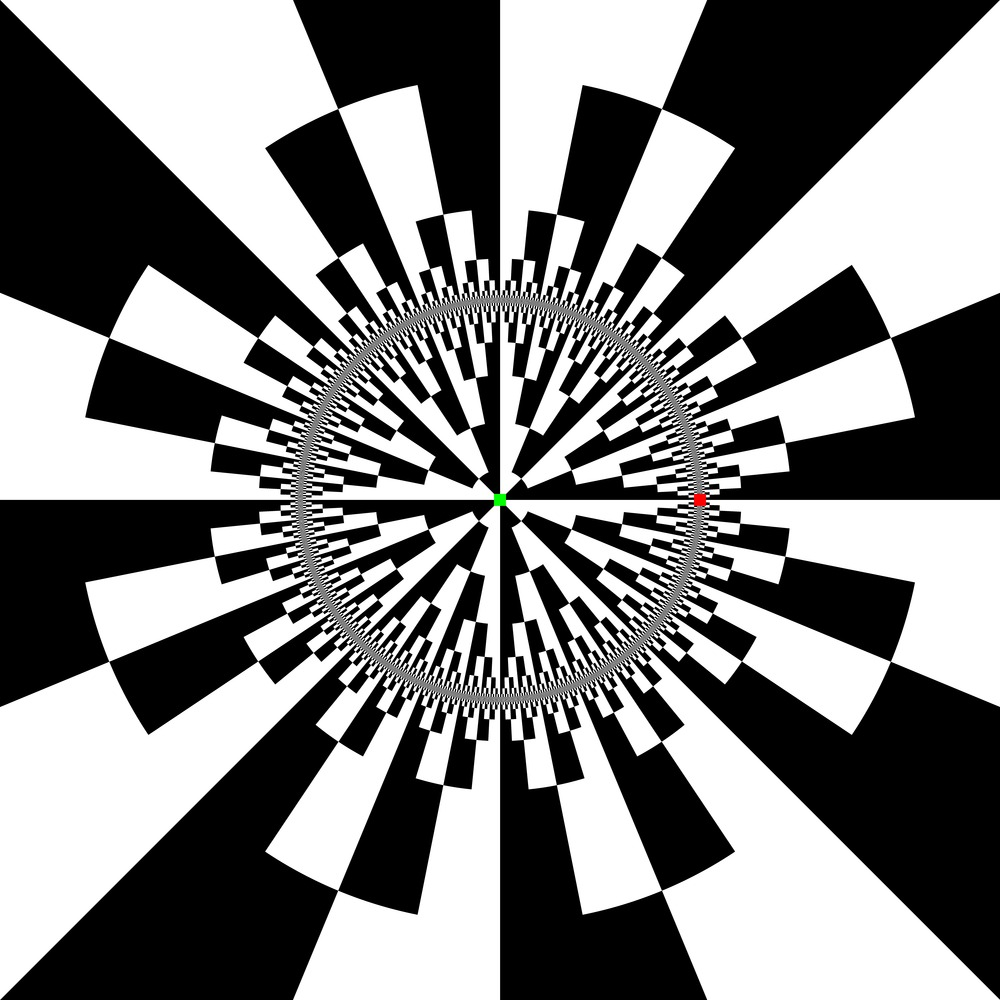 Fatou sets for f 0 ( z ) = z ∗ z {\displaystyle f_{0}(z)=z*z\,} .